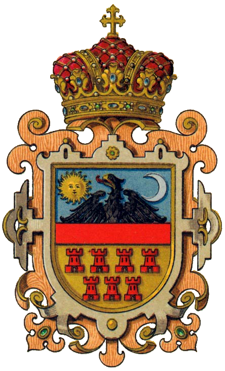 Wappen des Großfürstentums Siebenbürgen